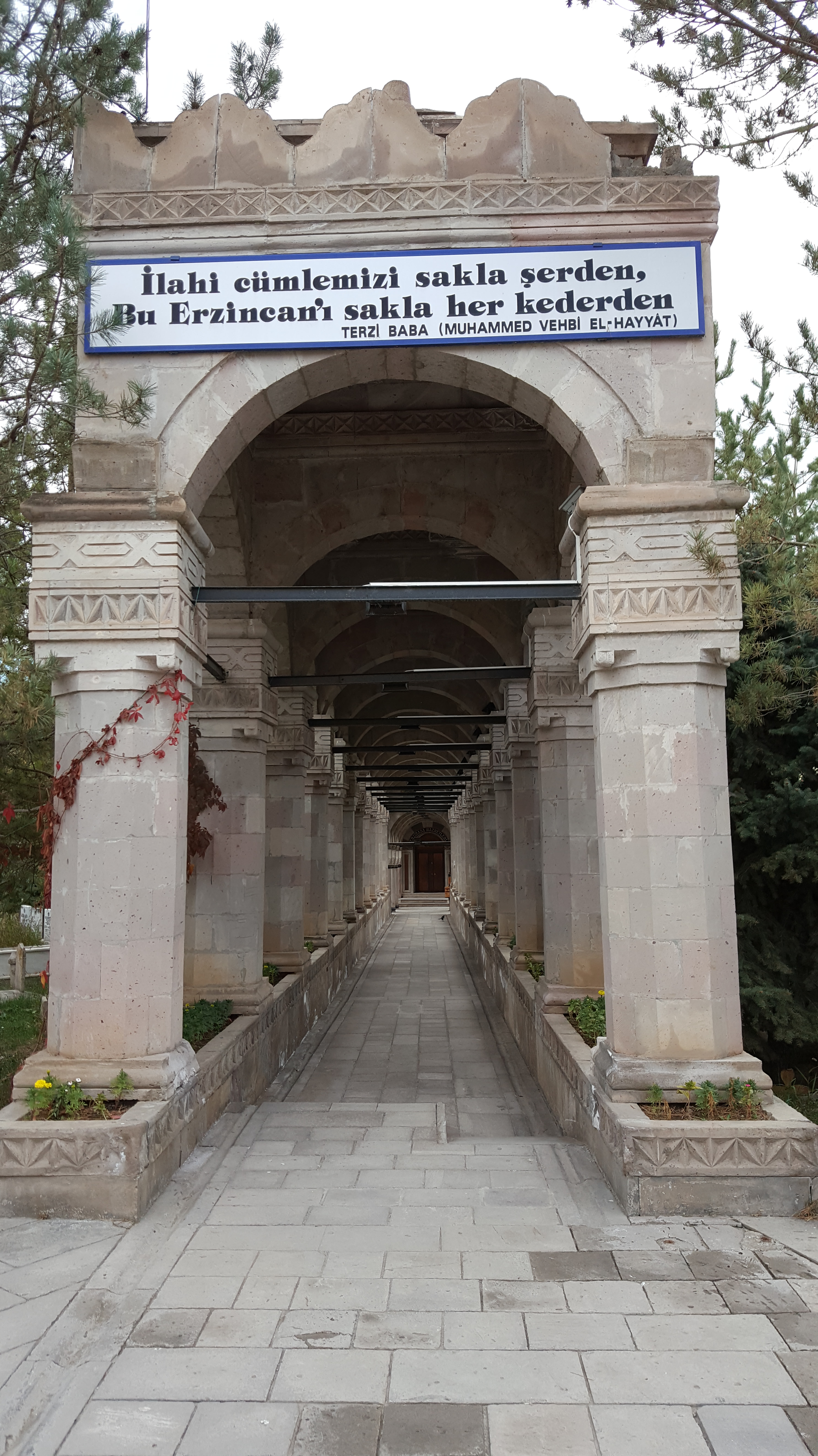 Erzincan'da bulunan Terzi Baba Türbesinden 2016 yılına ait bir fotoğraf.